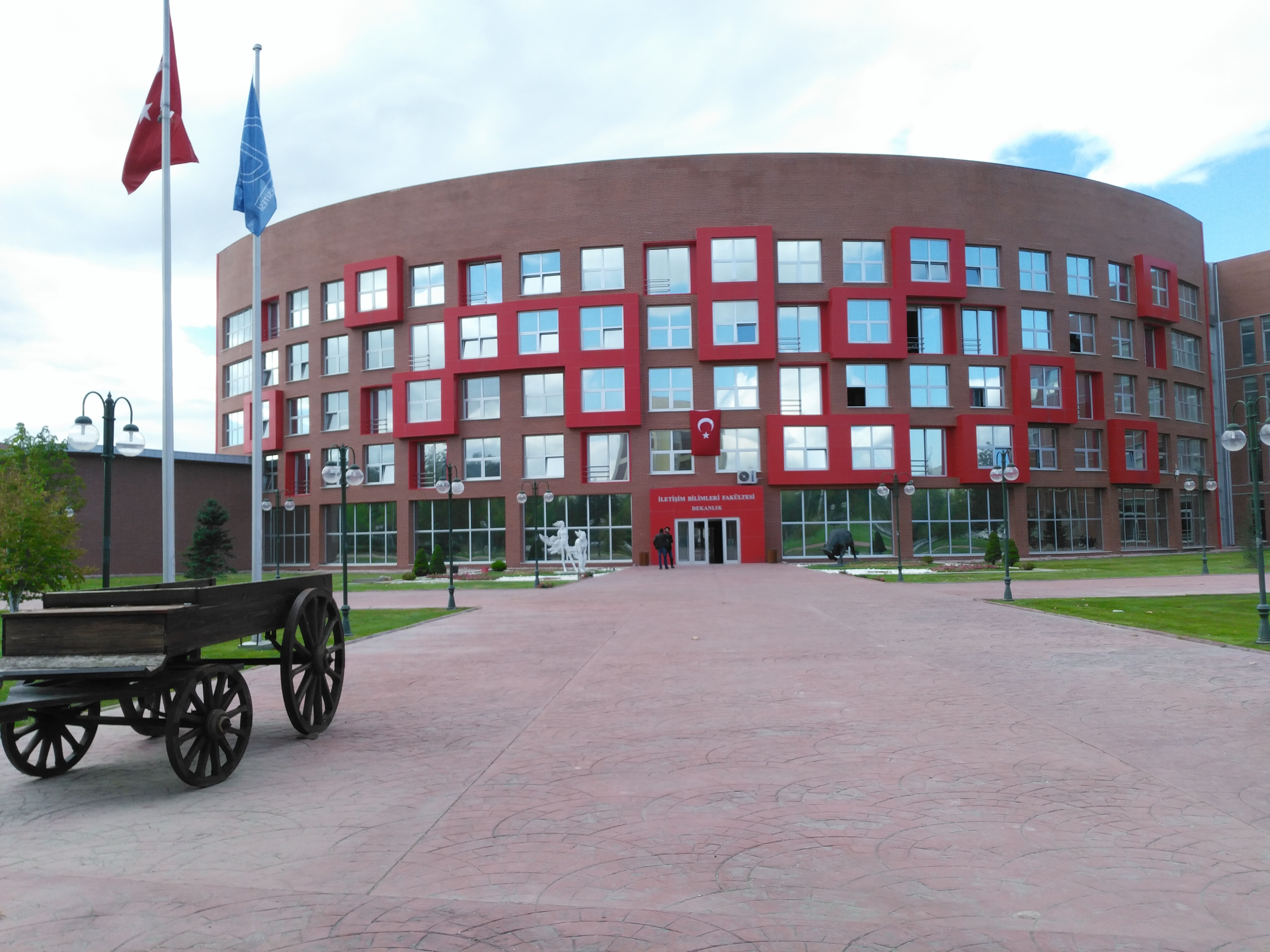 Anadolu Üniversitesi İletişim Fakültesinin önü